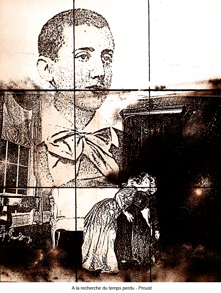 Montjouvain